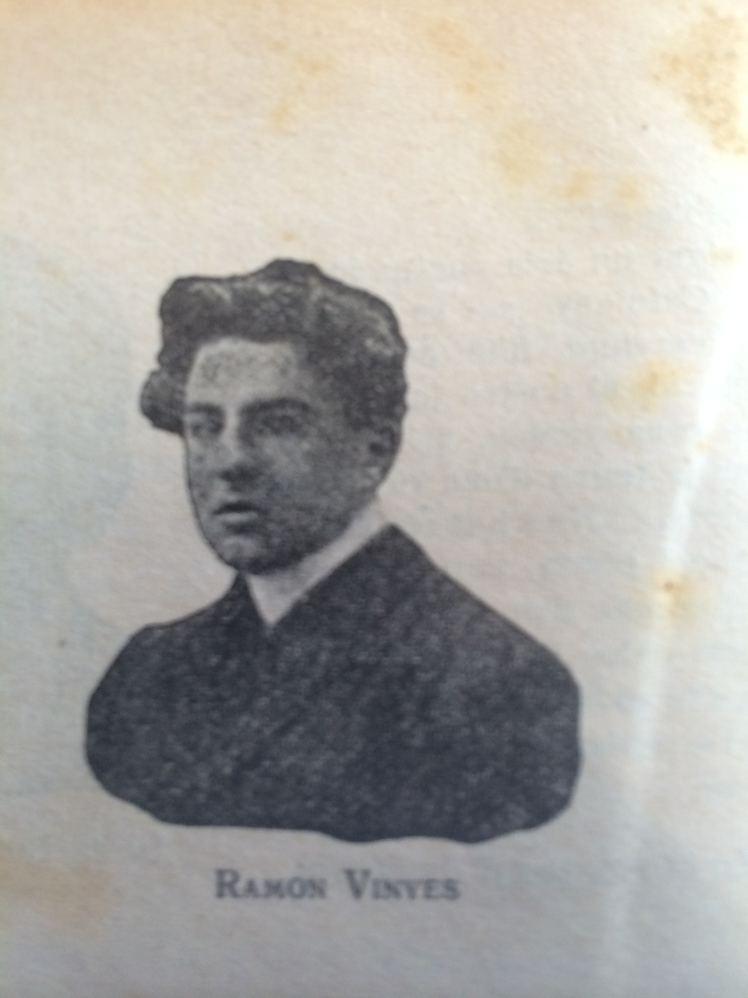 Ramon Vinyes i Cluet (Berga, 8 de maig de 1882 – Barcelona, 5 de maig de 1952) fou un escriptor d'obres de teatre modernistes i contes.